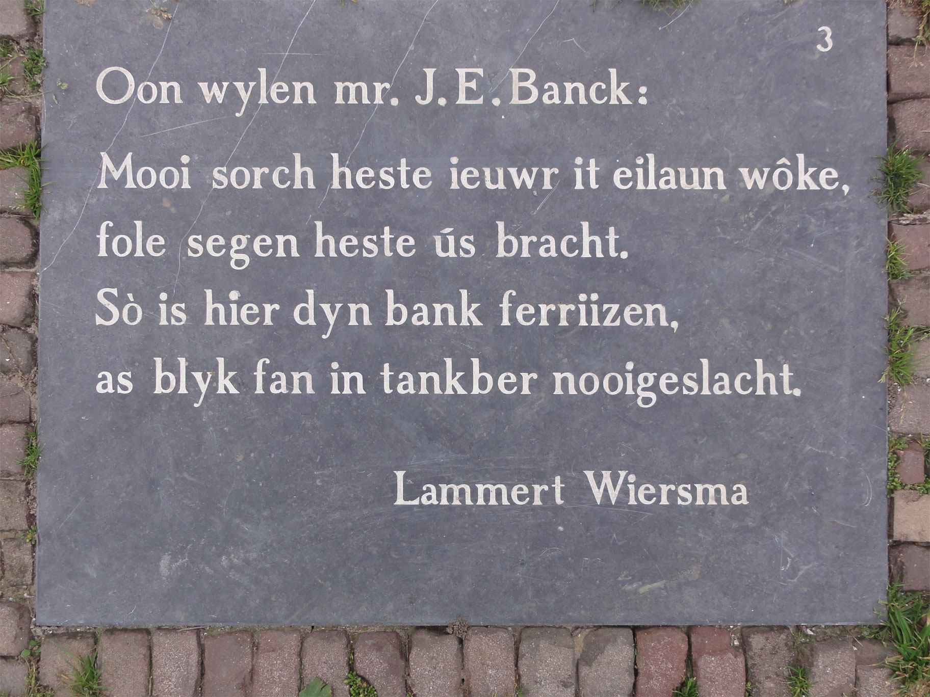 Taalroute Schiermonnikoog bij monument voor mr. Johan Eric Banck